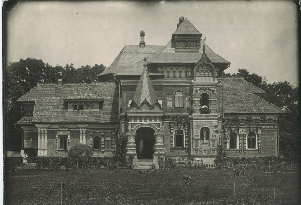 Білорі́чиця — село Прилуцького району Чернігівської області (до 1945 року Вейсбахівка